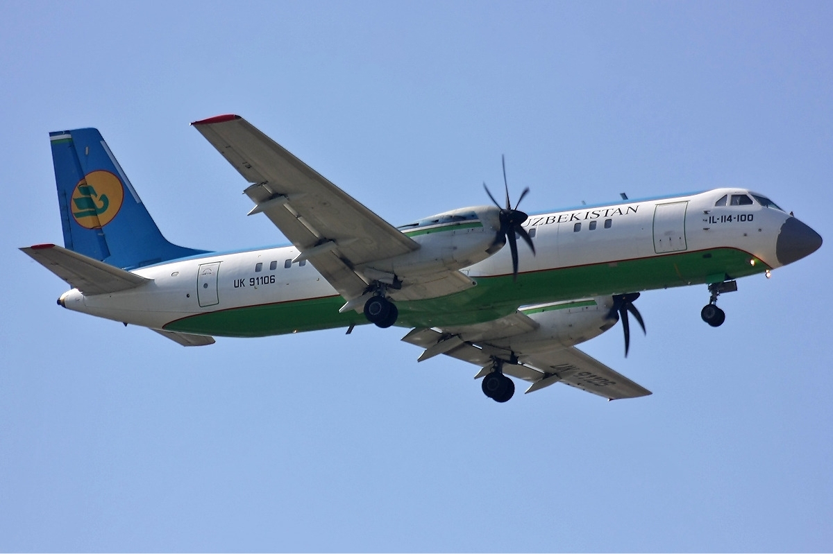 Uzbekistan Airways Ilyushin Il-114-100